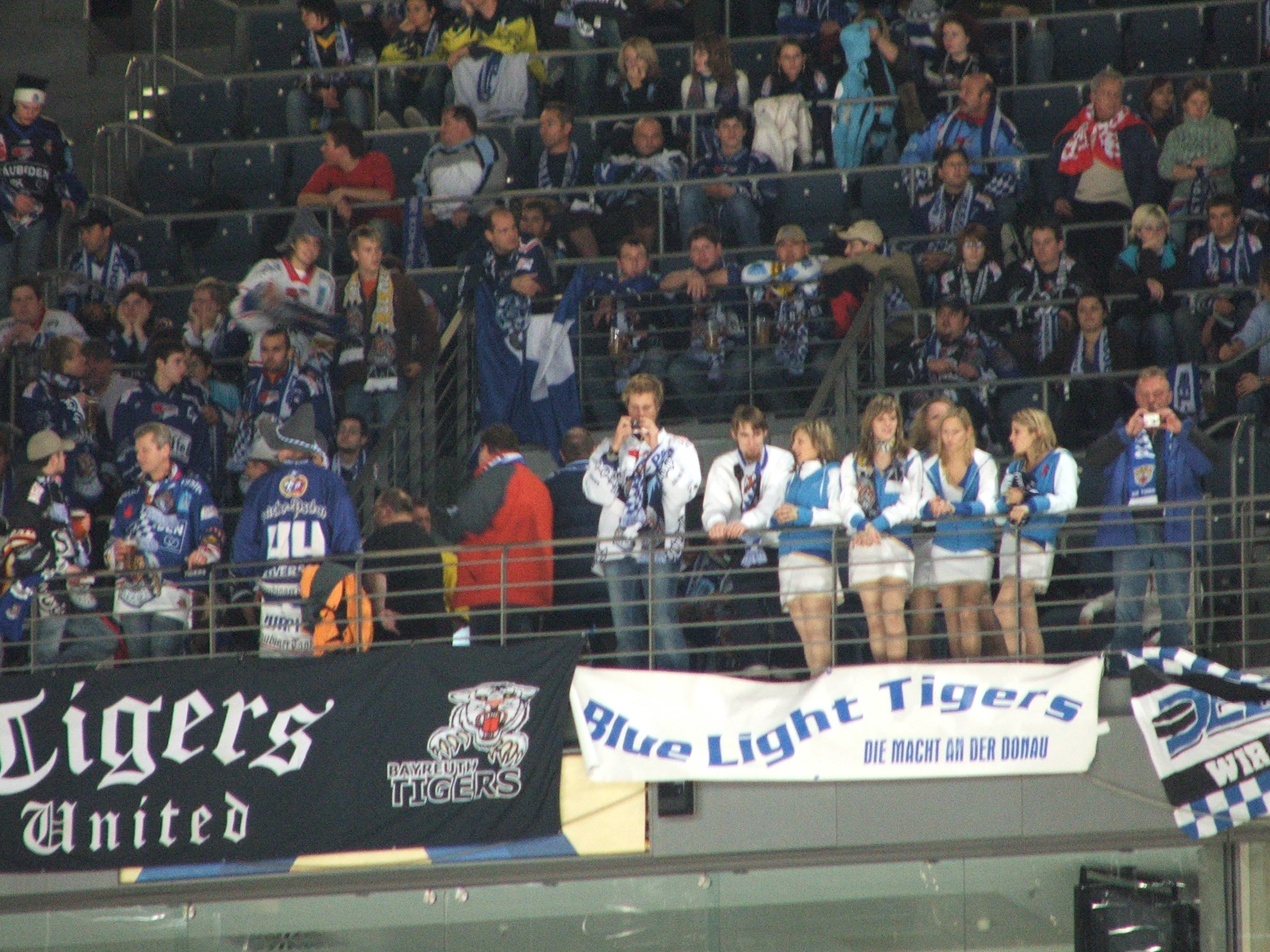 Fans der Straubing Tigers beim Auswärtsspiel in Köln